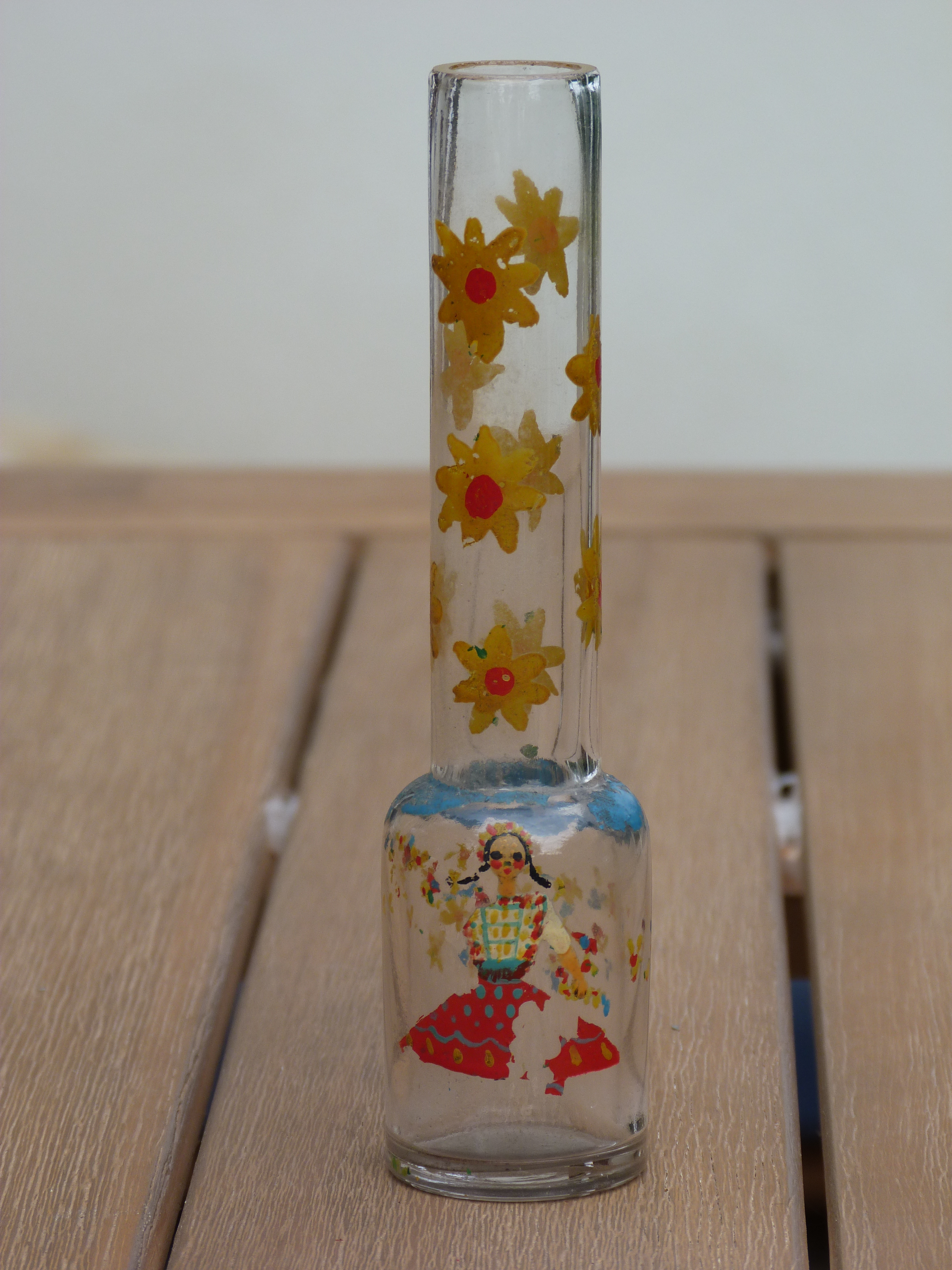 Butella. Pálinkás butykos. A felvétel 2013. október 19 -én készült. ©© Derzsi Elekes Andor, Budapest, 2013, You are authorised to use these photos and vids under Creative Commons – even for commercial, for profit purposes. Photos must be attributed to Derzsi Elekes Andor. All of the photos and vids in the Metapolisz DVD line are under Creative Commons and can be used even for commercial – for profit – purposes. Recommended Citation Derzsi Elekes Andor: Metapolisz DVD line